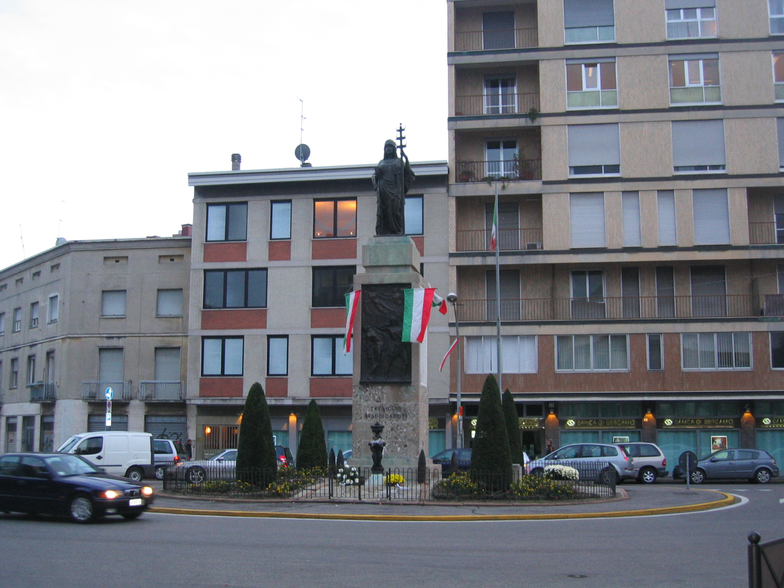 Piazza Insurrezione, Treviglio.